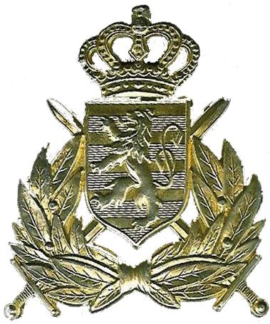 Ofzeeche vun der Lëtzebuerger Arméi.